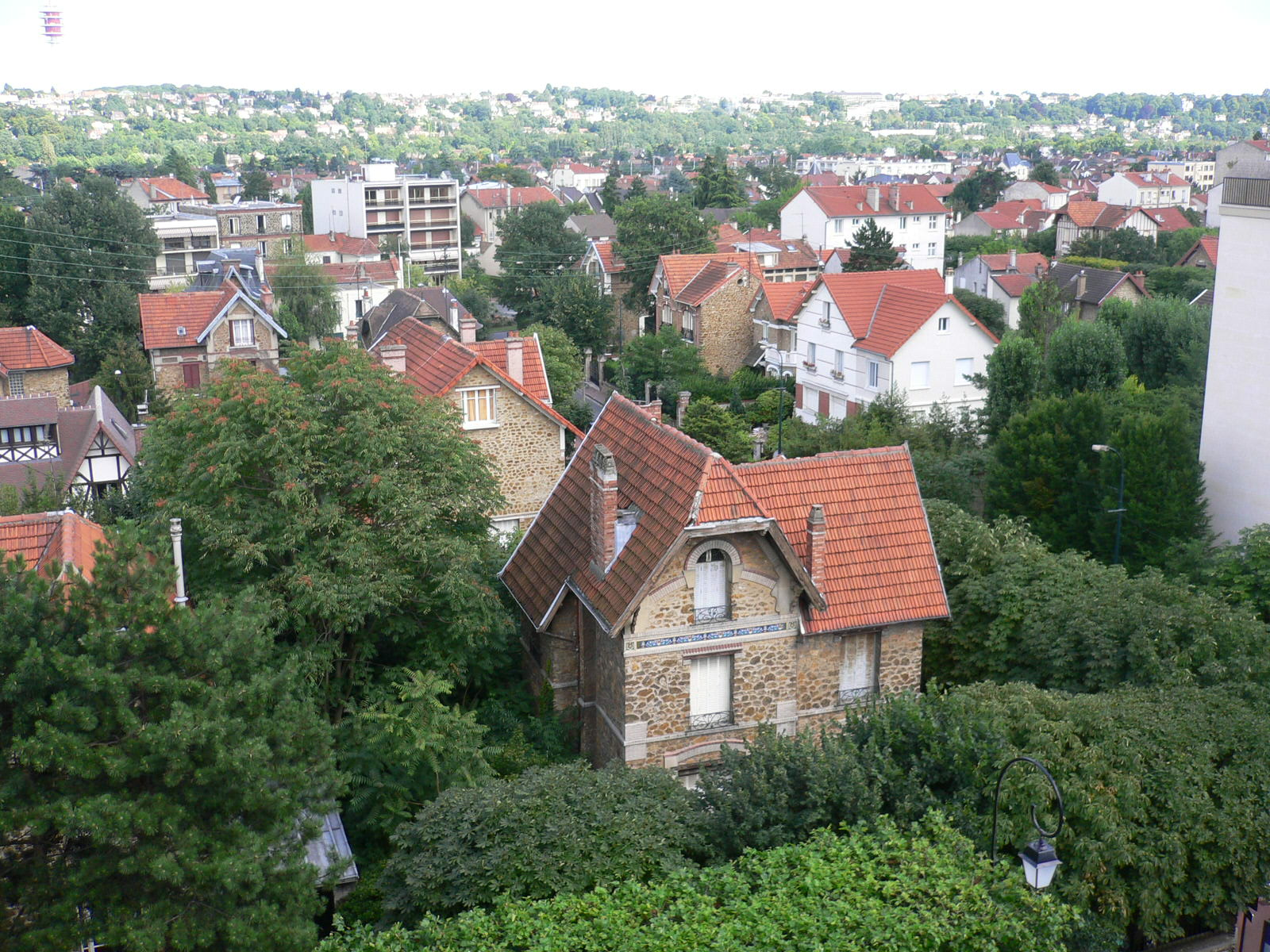 rue Joséphine Adam